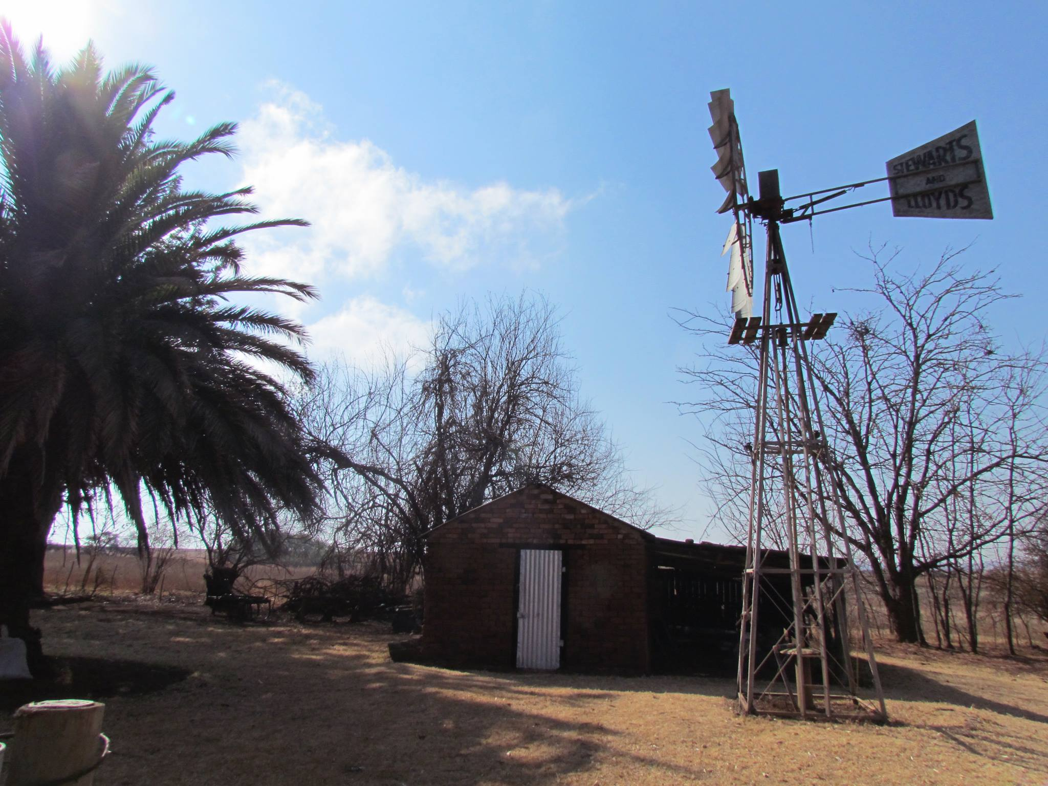 Stewarts & Lloyds windpomp op 'n plaas in die Hartelus distrik naby Roossenekal, Limpopo.